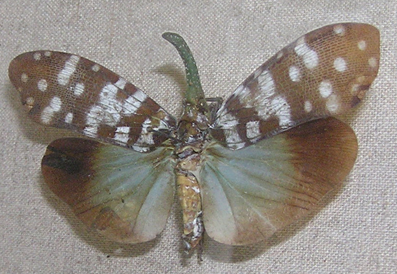 Fulgora maculata